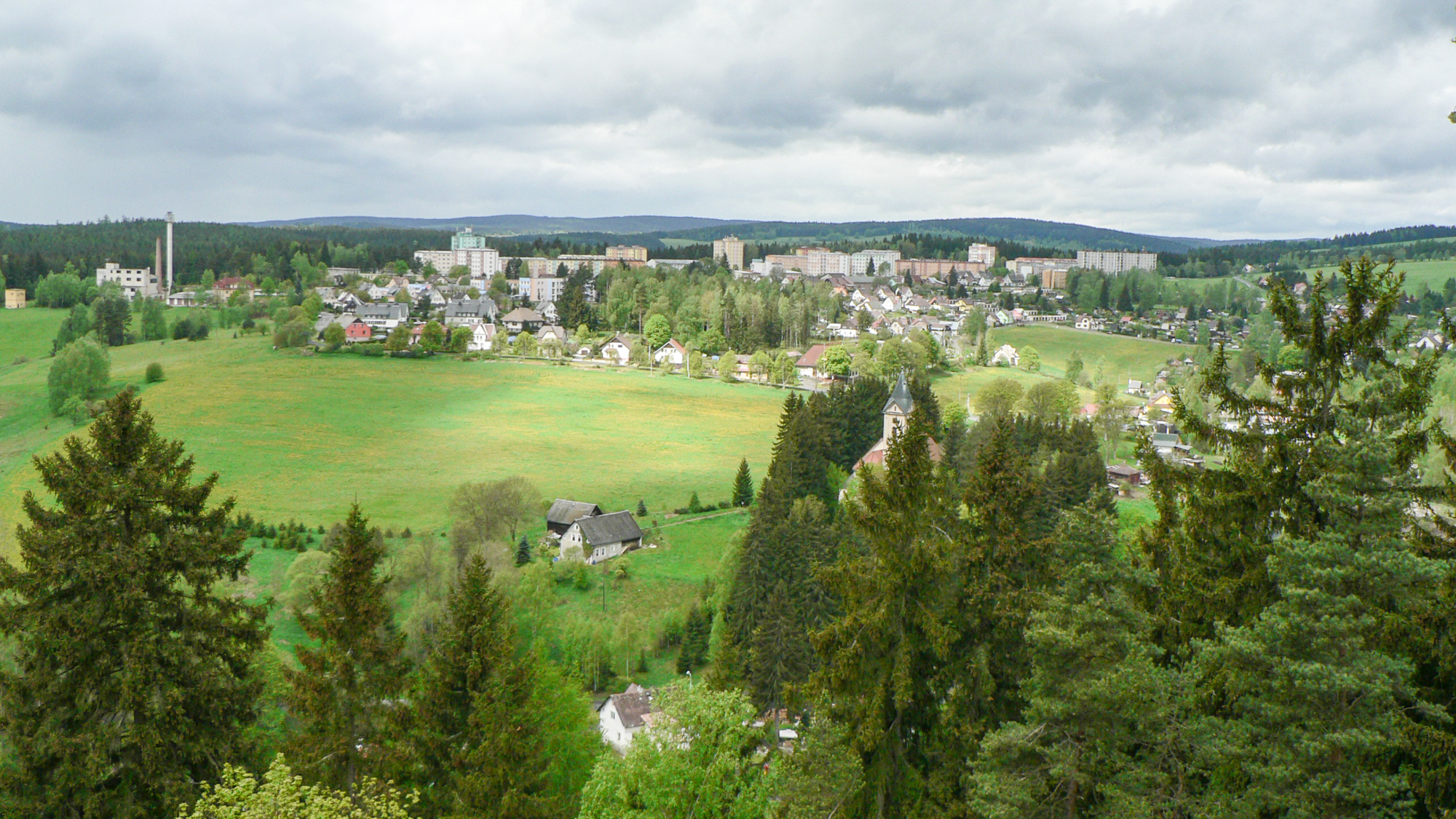 Pohled na město Rotavu z přírodní památky Rotava.